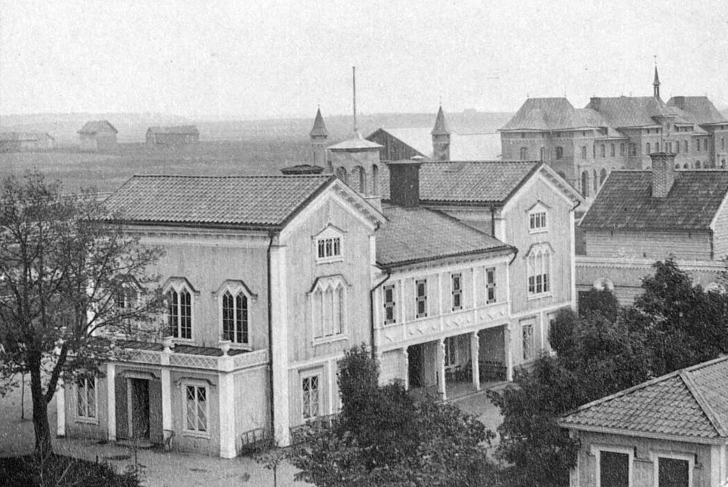 Restaurang Rullan i Uppsala cirka 1868.